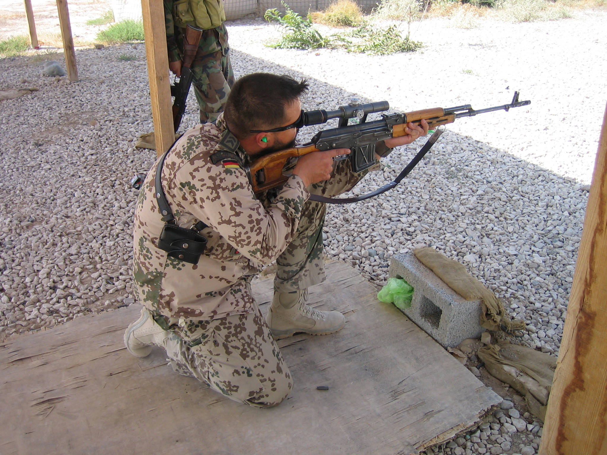 OMLT Militärberater Scharfschützenausbildung mit der PSL bei der ANA (Afghanische Nationalarmee)